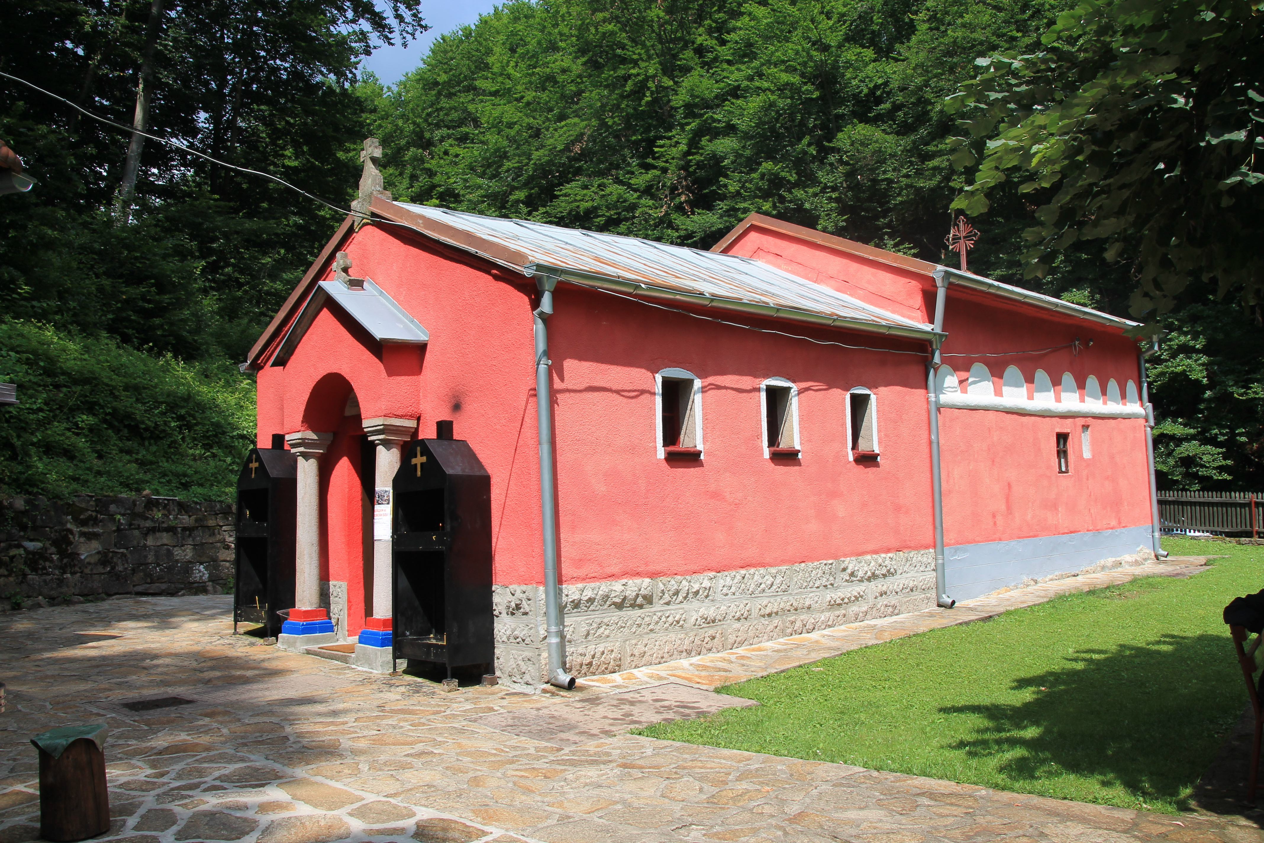 Crkva Rođenja Presvete Bogorodice (Gornja Trepča)